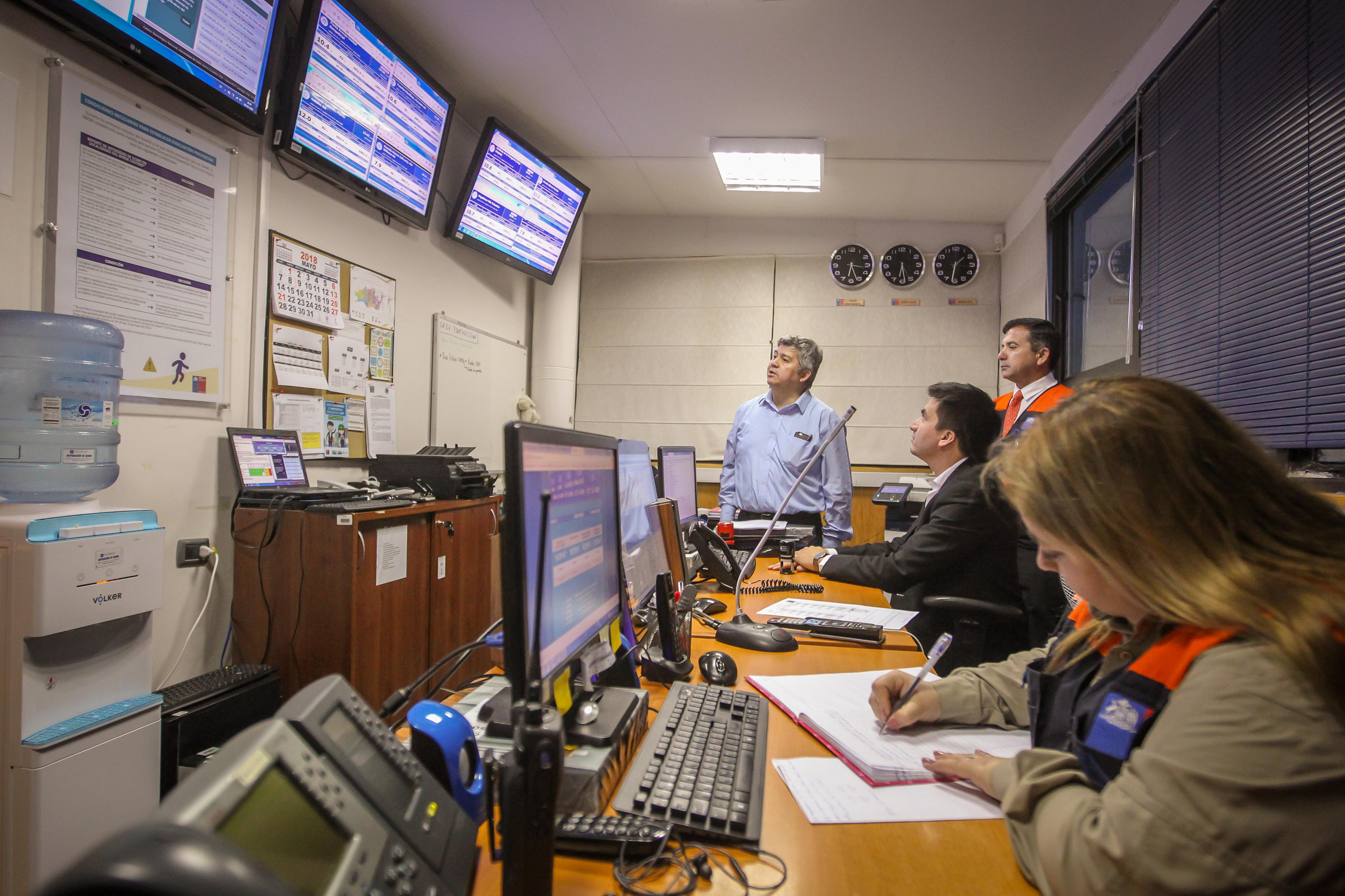 9 de Mayo 2018/PUNTA ARENAS El Intendente (s) Nicolás Cogler, participa del cierre del taller impartido por ONEMI donde se capacitó a funcionarios de los municipios de la region. FOTO: JOEL ESTAY/INTENDENCIA MAGALLANES